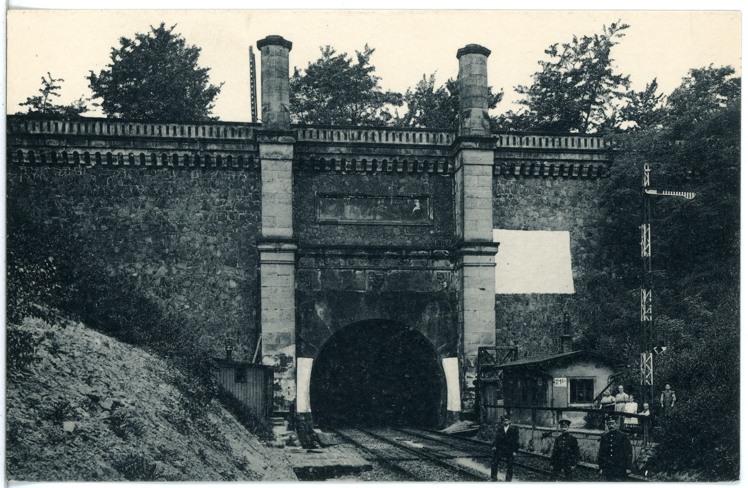 Niederau; Eisenbahntunnel This postcard is from publisher Brück & Sohn in Meißen ( postcard has a unique number 19857 and is available in a higher resolution at the publisher. This images was uploaded in a cooperation project between Wikipedians and the publisher.